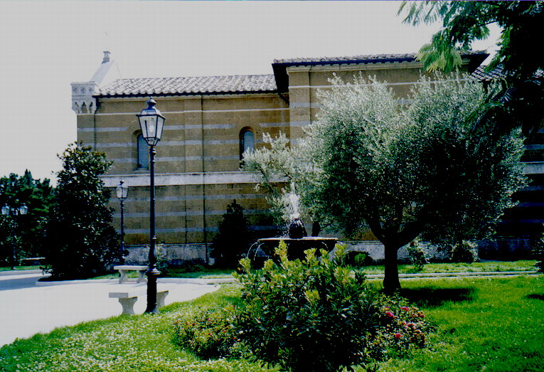 Fianco laterale della Cappella di Santa Maria e giardino del Castello di Montorio (GR), foto da apparecchio non digitale del 27/08/2005